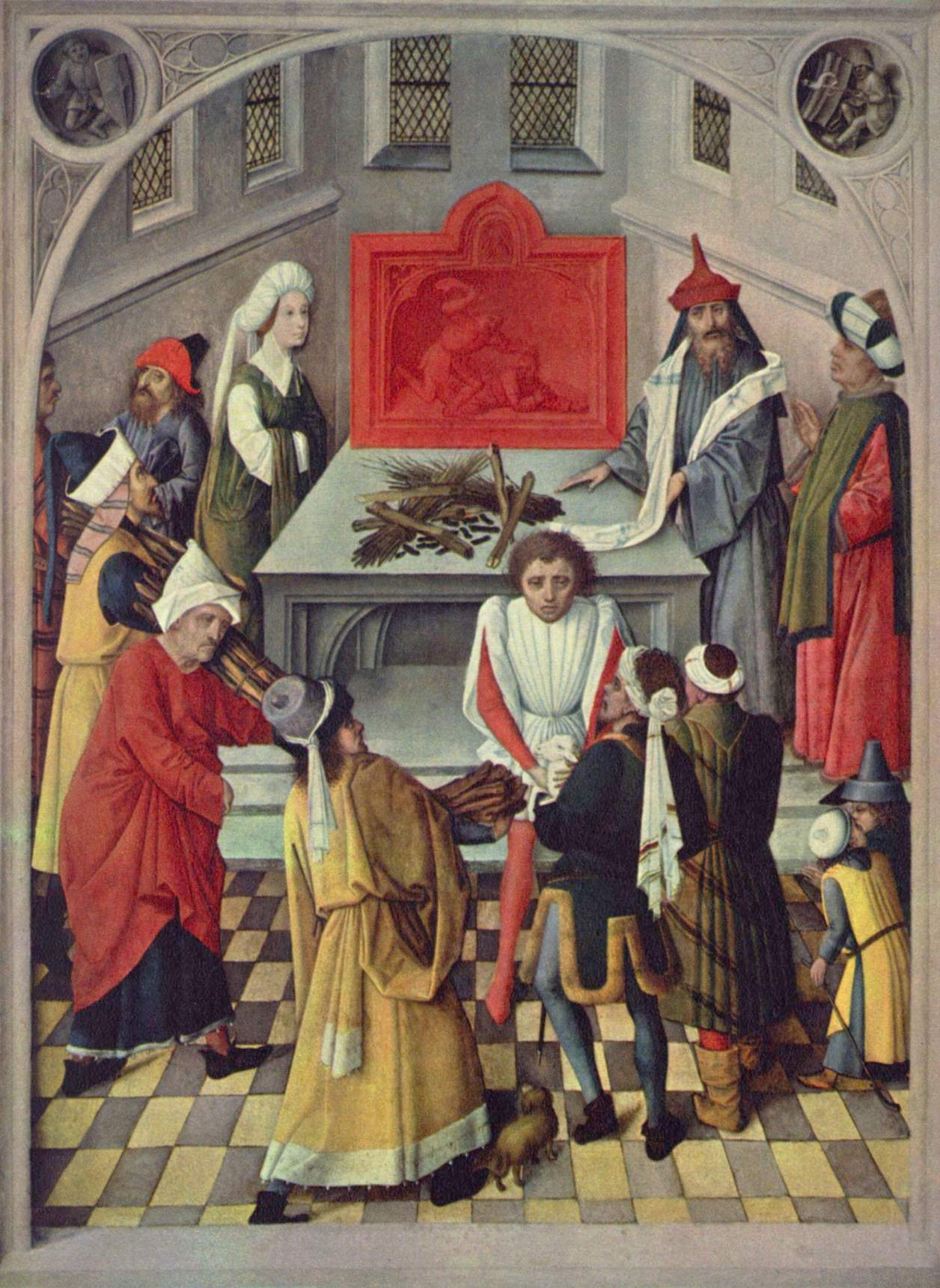 Rechter binnenluik van een drieluik. Op de buitenzijde de Heilige Petrus in grisaille. Voor het linker binnenluik, zie File:Douai chartreuse maitre de la manne.jpg.